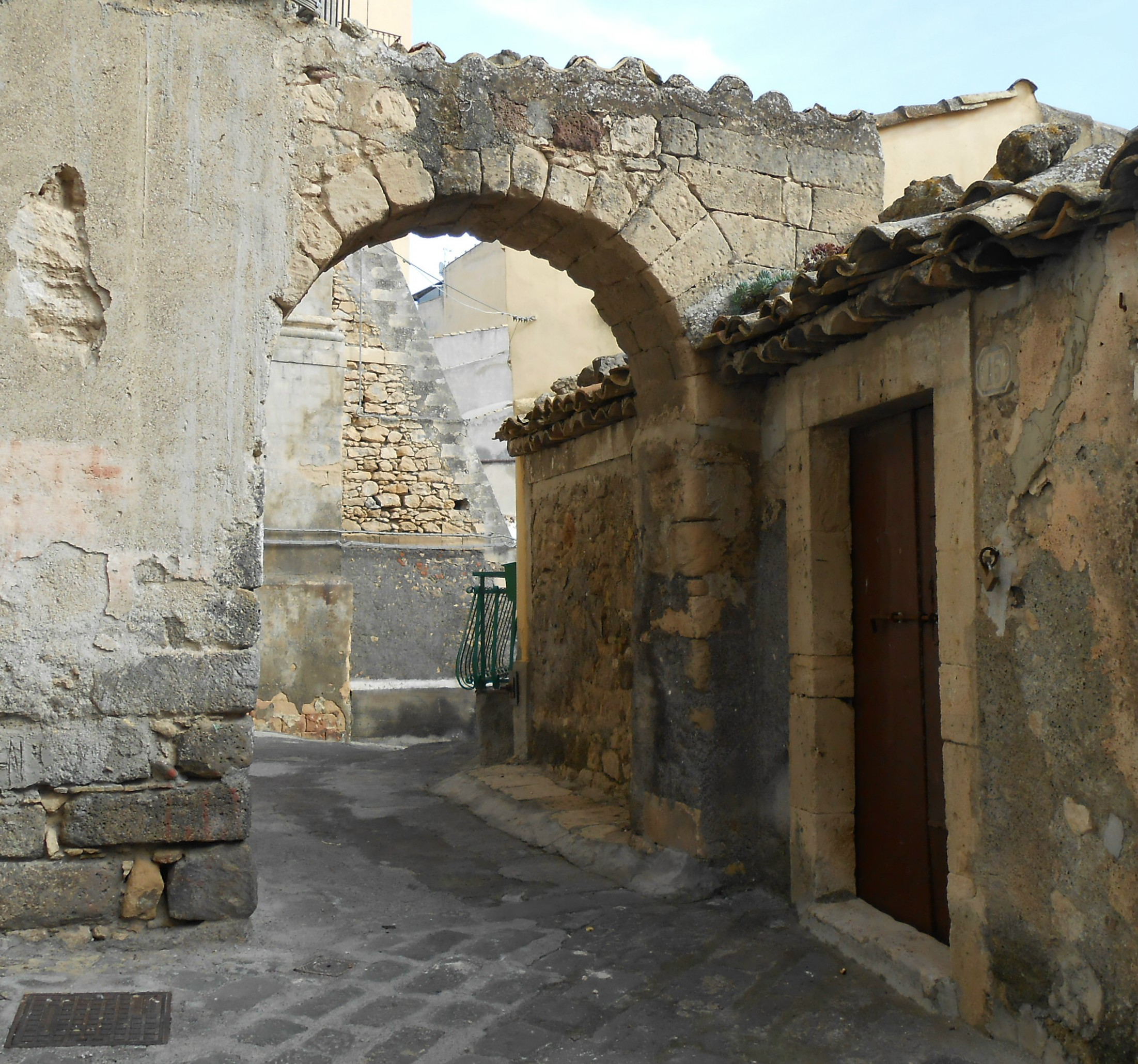 La "Porta del bastione" lungo il tracciato delle antiche mura di Militello fatte costruire da Abbo Barresi nel 1337.